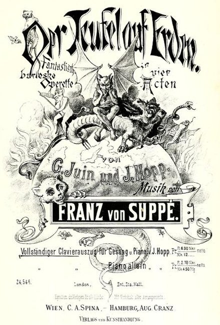 Franz von Suppé Der Teufel auf Erden Klavierauszug Verlag Carl Anton Spina / August Cranz